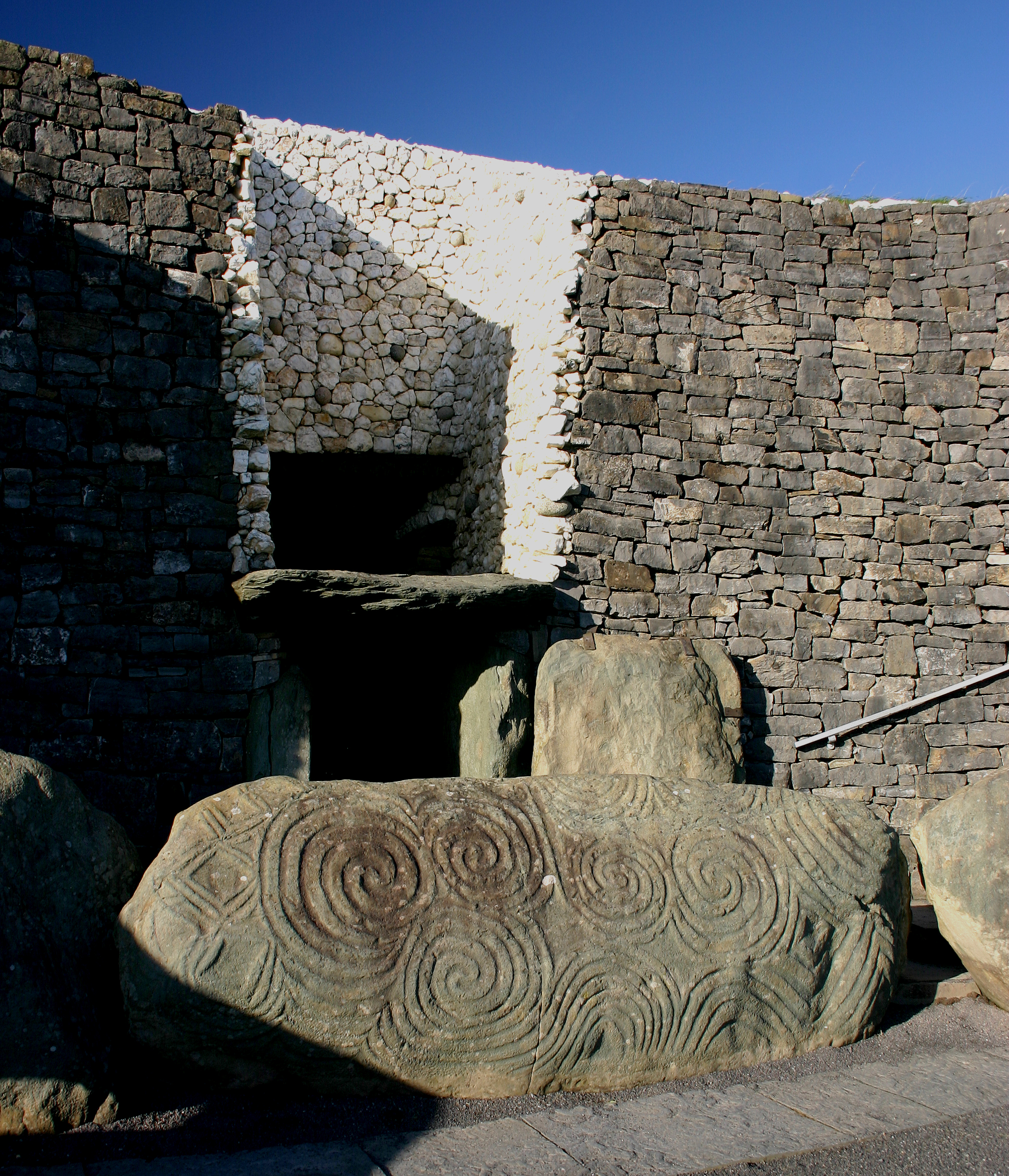 Newgrange, a tumulus bejárata (Írország)